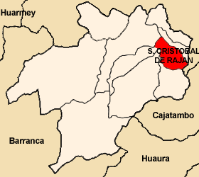 San Cristóbal de Raján